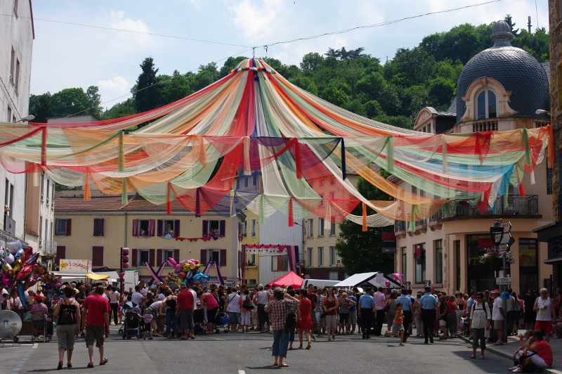 Rue de la Pëcherie, Tarare, Rhône (69), France lors de la Fête des Mousselines 2010.